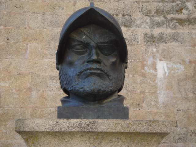 Francisco de Orellana en Trujillo (Cáceres)